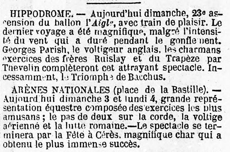 Publicité pour les spectacles données le dimanche 3 août 1851 à Paris à l'Hippodrome [Hippodrome de l'Etoile] et aux Arènes nationales (place de la Bastille) et de l'Hippodrome de Paris.